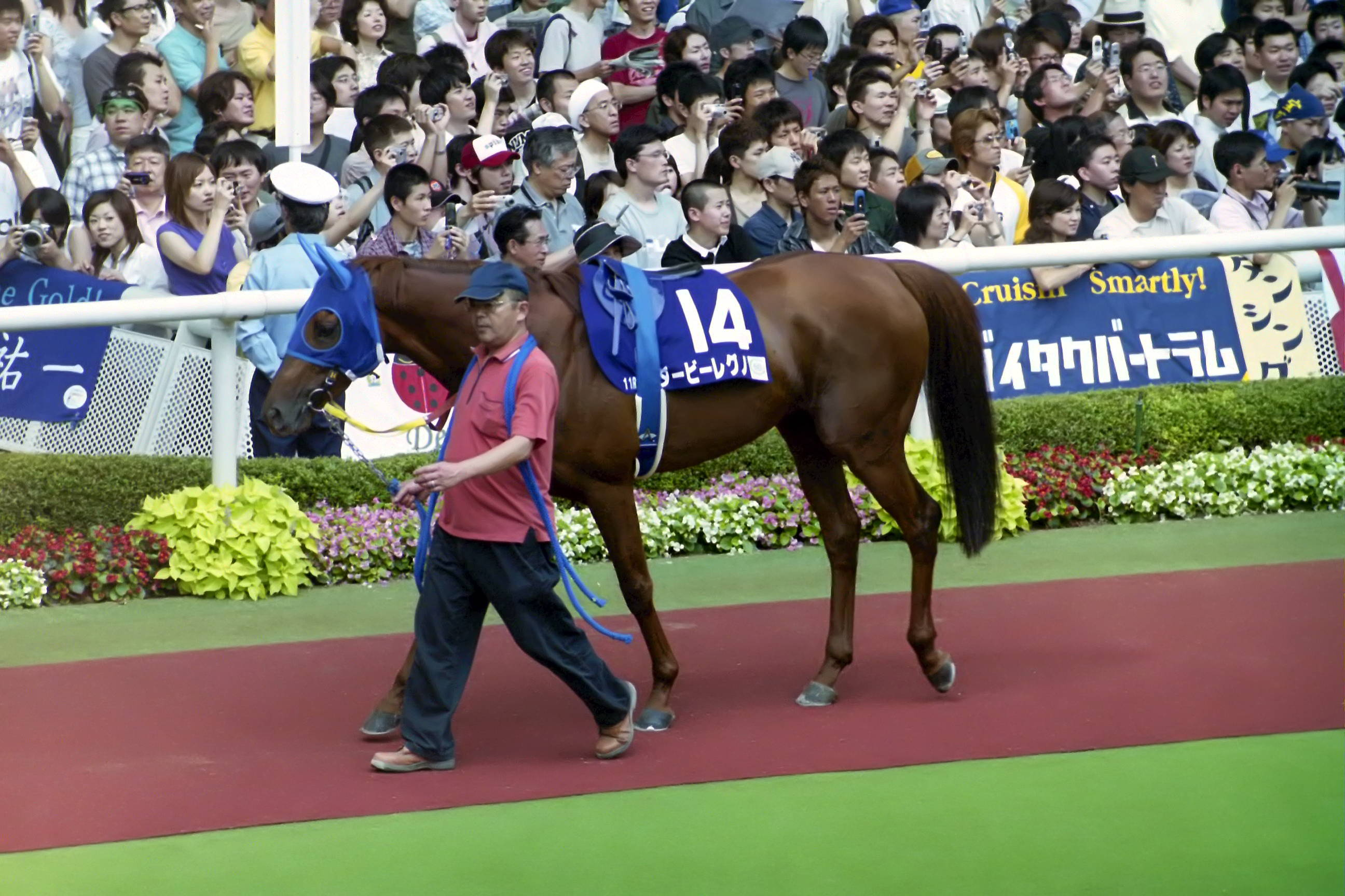 ダービーレグノ号